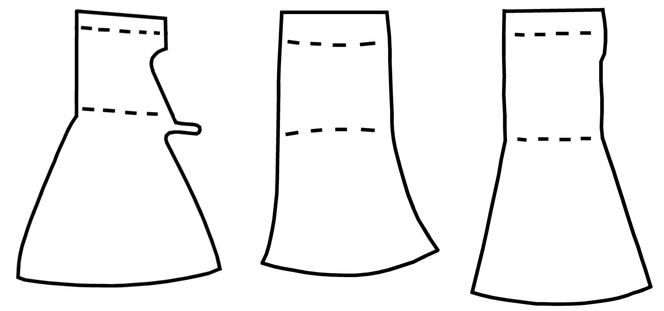 Axes